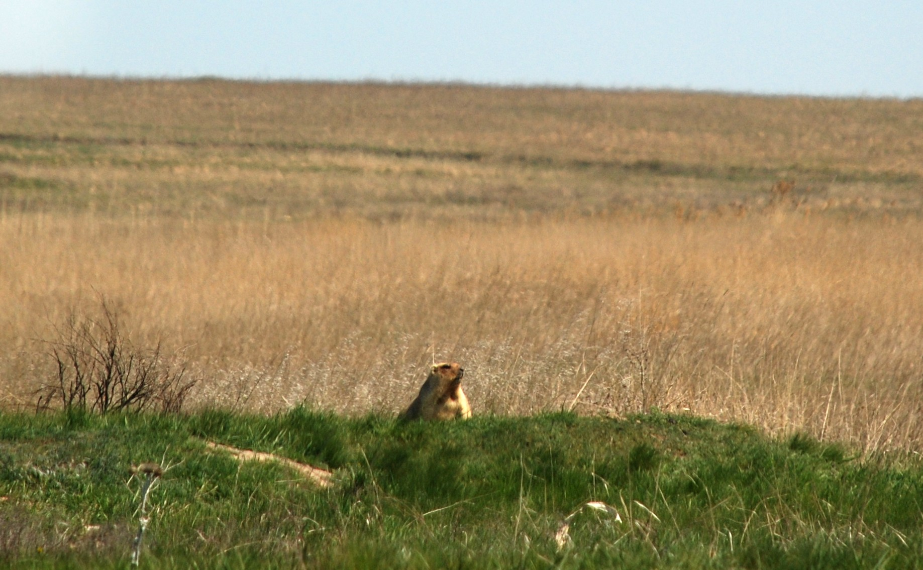 Балка Березова, Міловський район, на південь від с. Журавське на схід